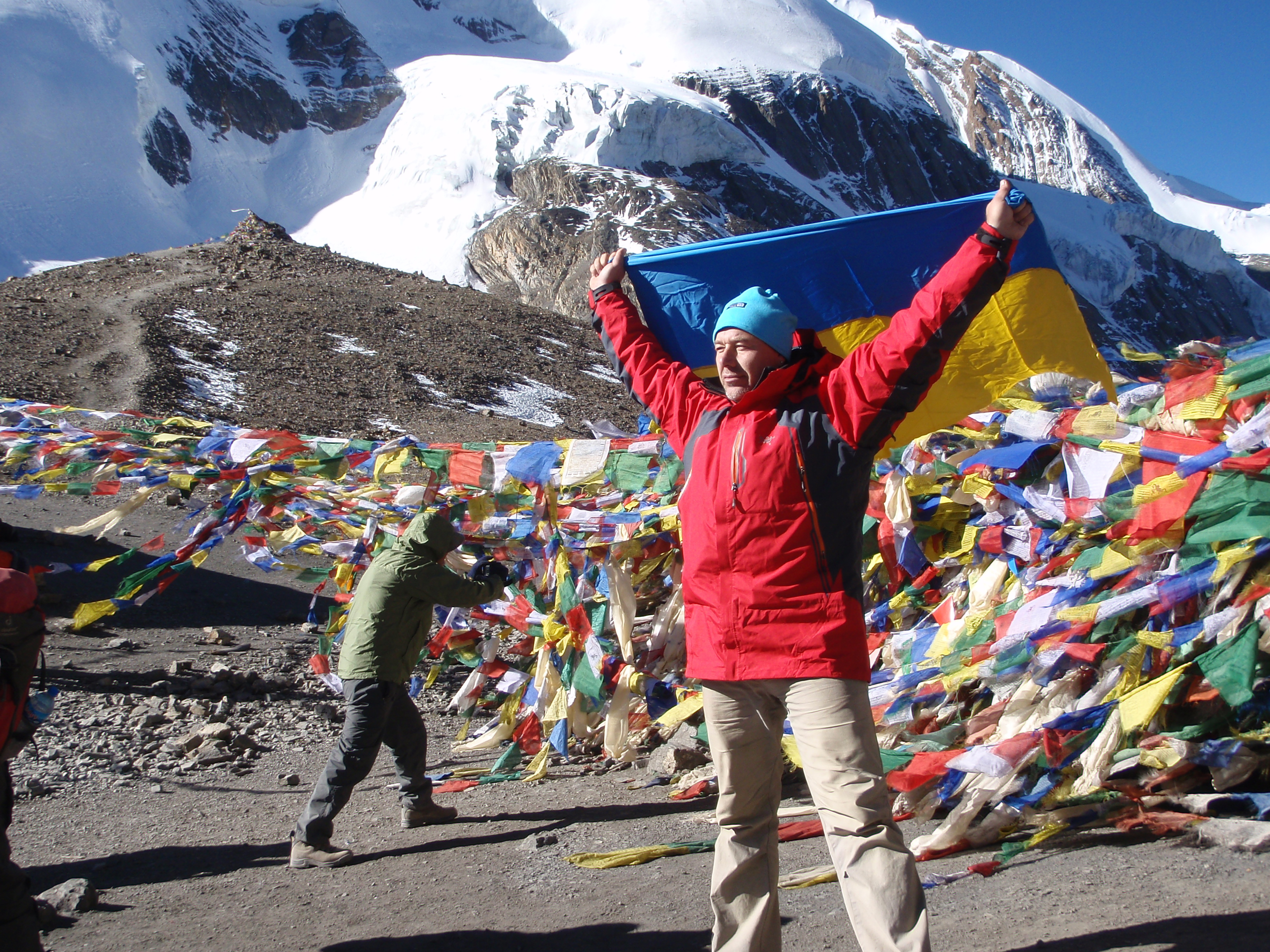 Український прапор на перевалі Торунг-Ла.